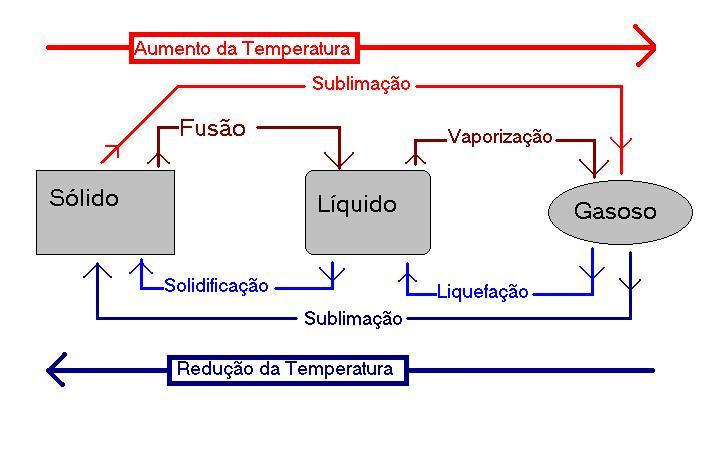 Esquema de mudança de estados físicos da matéria.